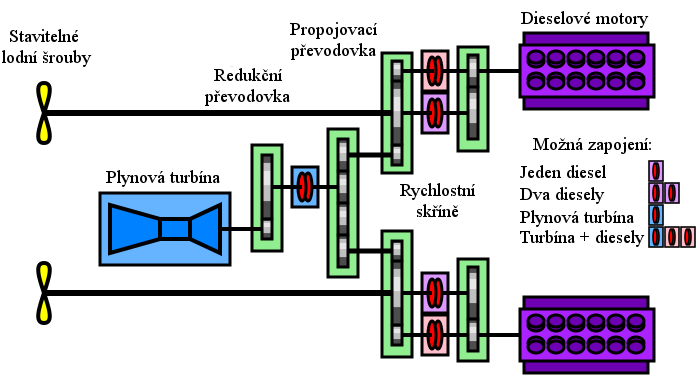 Schématický diagram zapojení námořního pohonného systému typu CODAG pro dvě hřídele. Redukční a propojovací převodovka bývají zpravidla spojeny v jednu. Pokud jsou spuštěny pouze dieselmotory, je plynová turbína odpojena (spojkou mezi redukční a propojovací převodovkou).